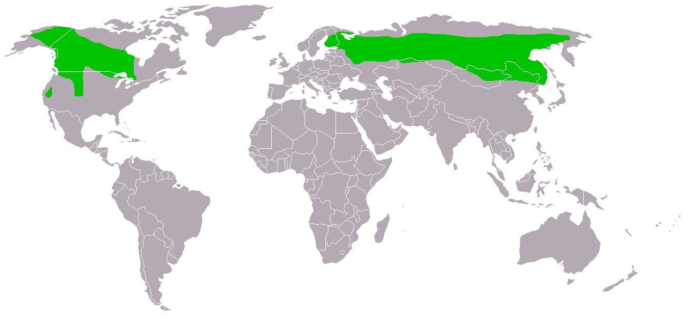 Bartkauz / Great Grey Owl (Strix nebulosa) Quelle: selber angefertigt